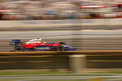 Kosuke Matsuura at Indianapolis 500